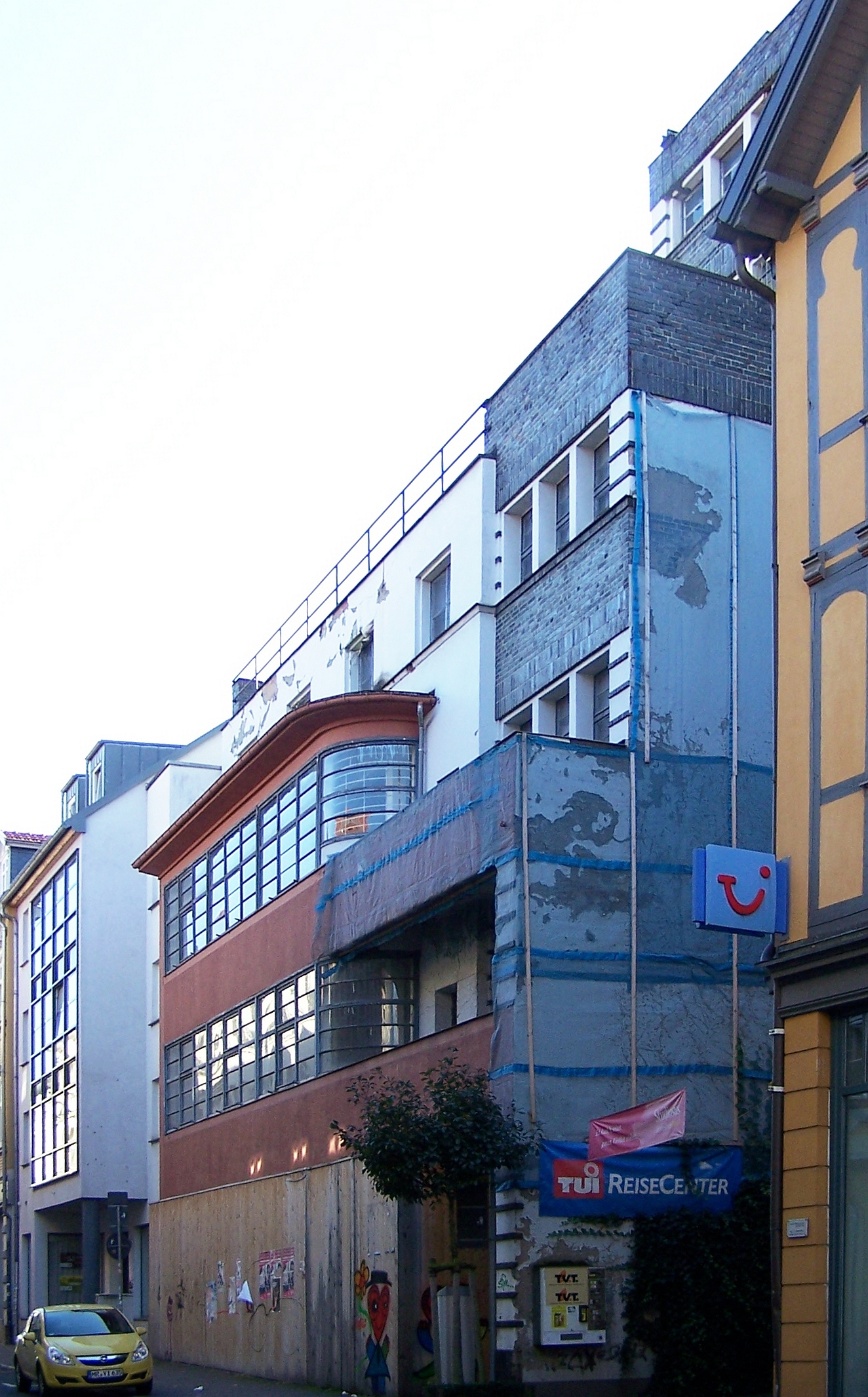 Das ehemalige Kaufhaus Goldschmiedenstraße 8-10 in der Eisenacher Altstadt ist ein 1930 erbautes Gebäude und sanierungsbedürftiges Baudenkmal der Wartburgstadt.